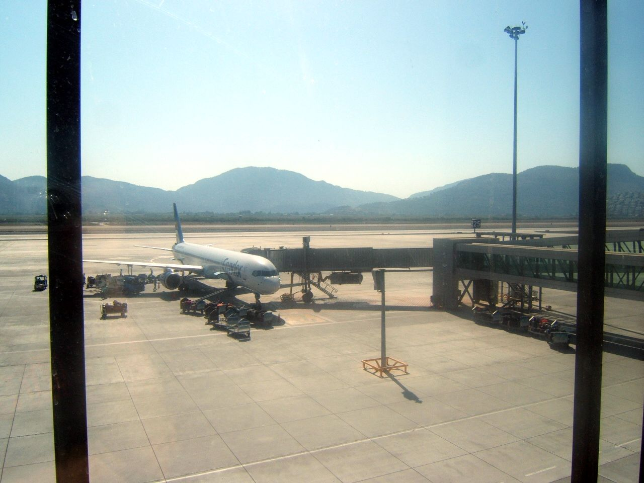 Dalam International Airport, Turkey